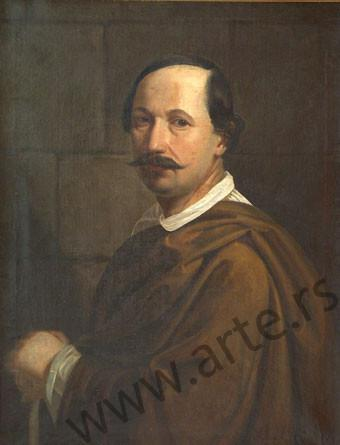 Автопортрет сербского художника Поповича Йована (1810-1864)